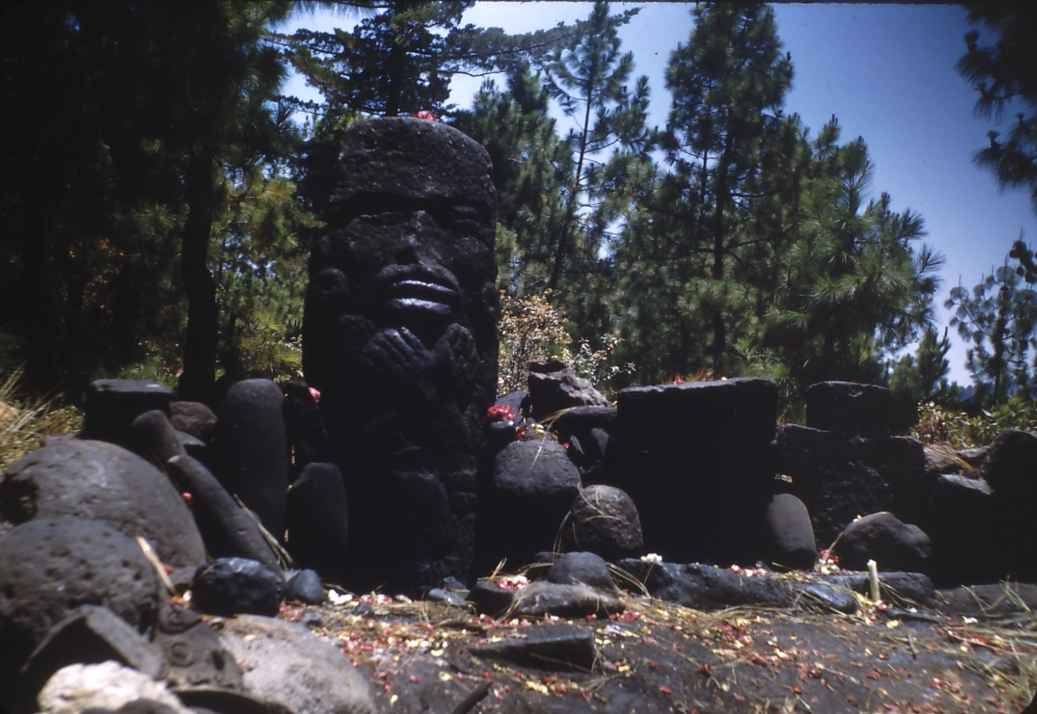 Altar still in use, Chichicastenango, Guatemala, 1948